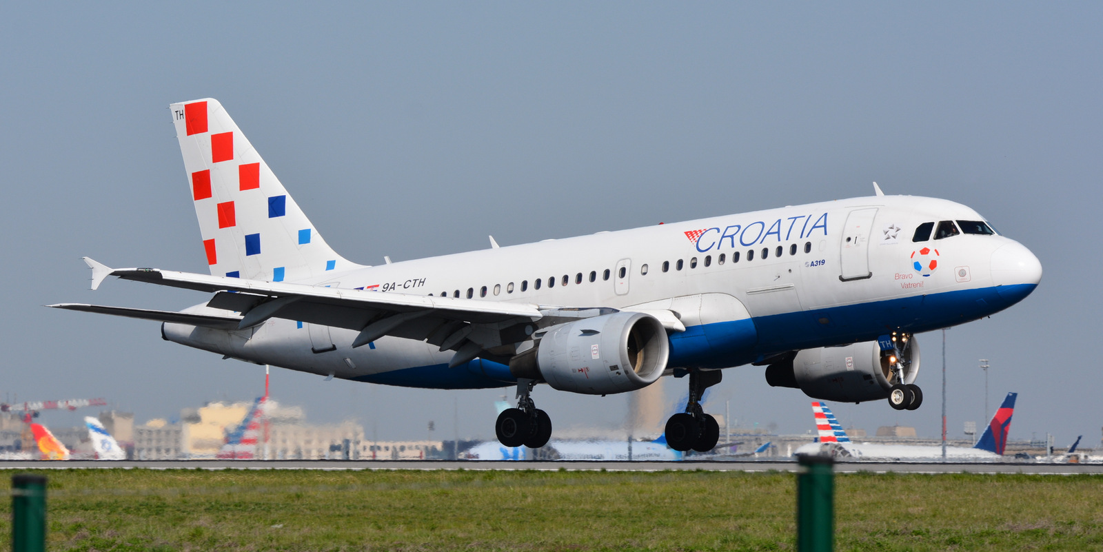 Airbus A319 9A-CTH "Bravo Vatreni" Croatia